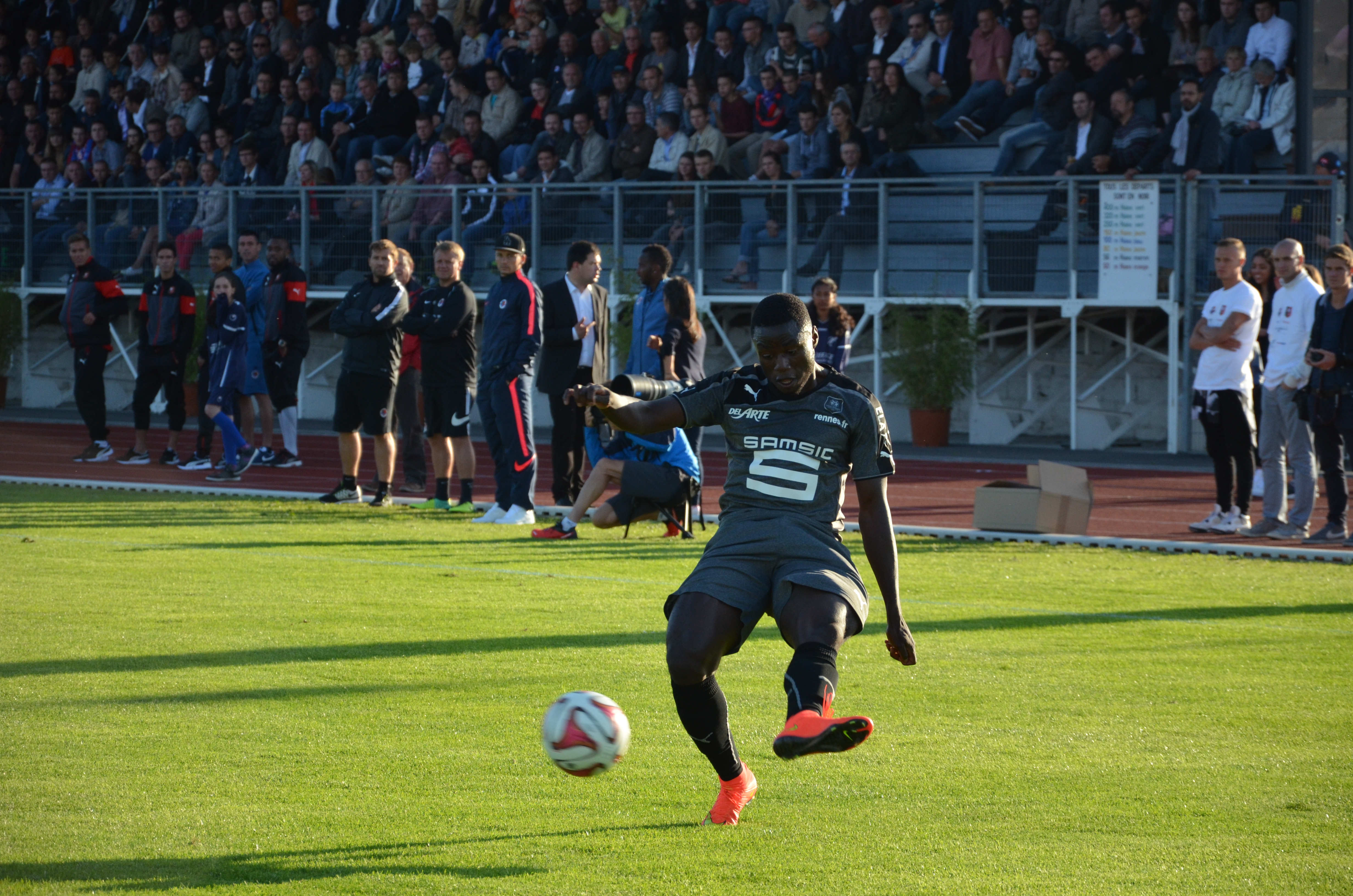 Photographie prise à l'occasion de la rencontre amicale opposant le Stade Malherbe de Caen au Stade rennais, le 9 juillet 2014 au stade Pierre-Comte de Vire. Ici, Paul-Georges Ntep.